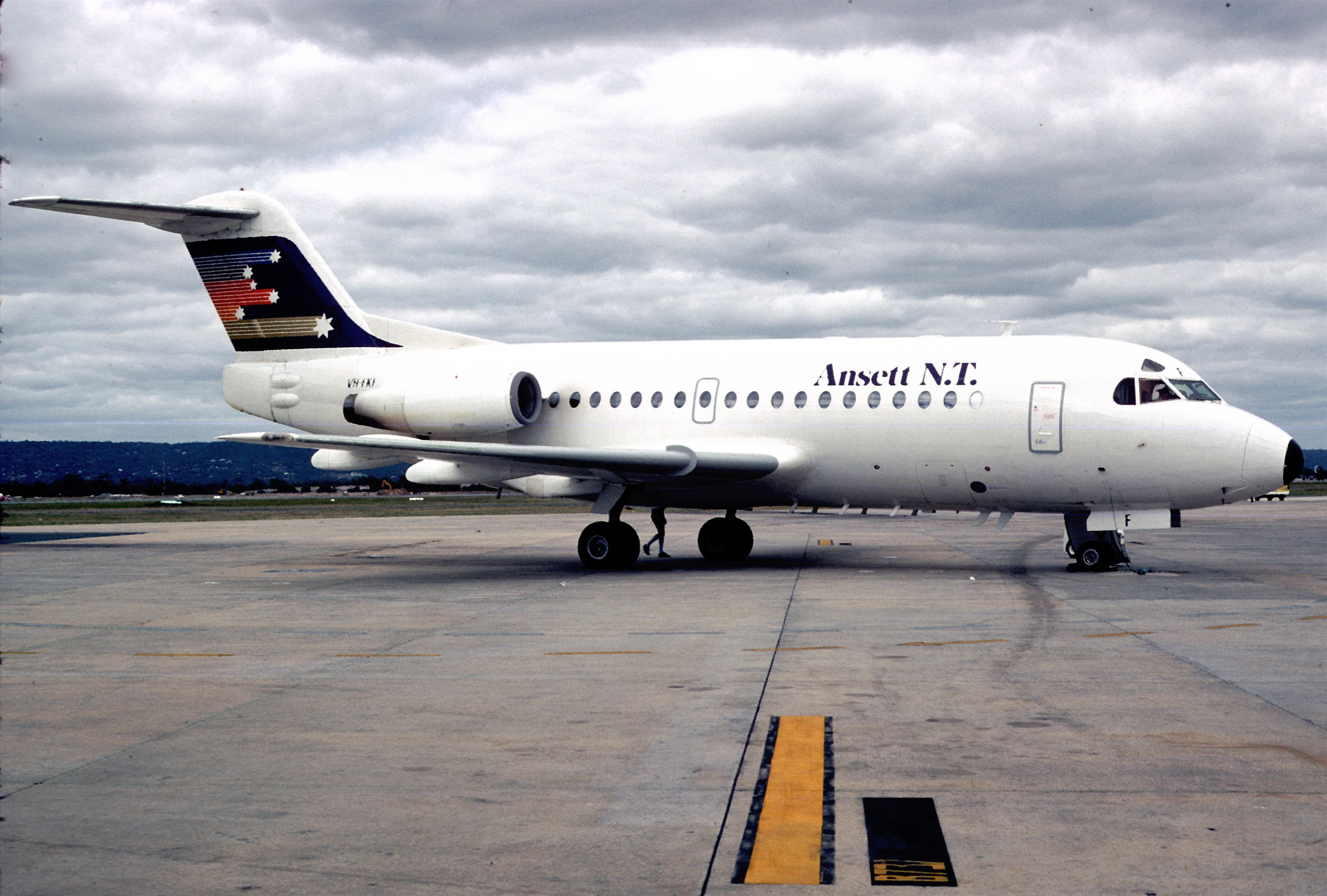 Ansett NT Fokker F28 Fellowship 1000; VH-FKF, April 1985/ BYM